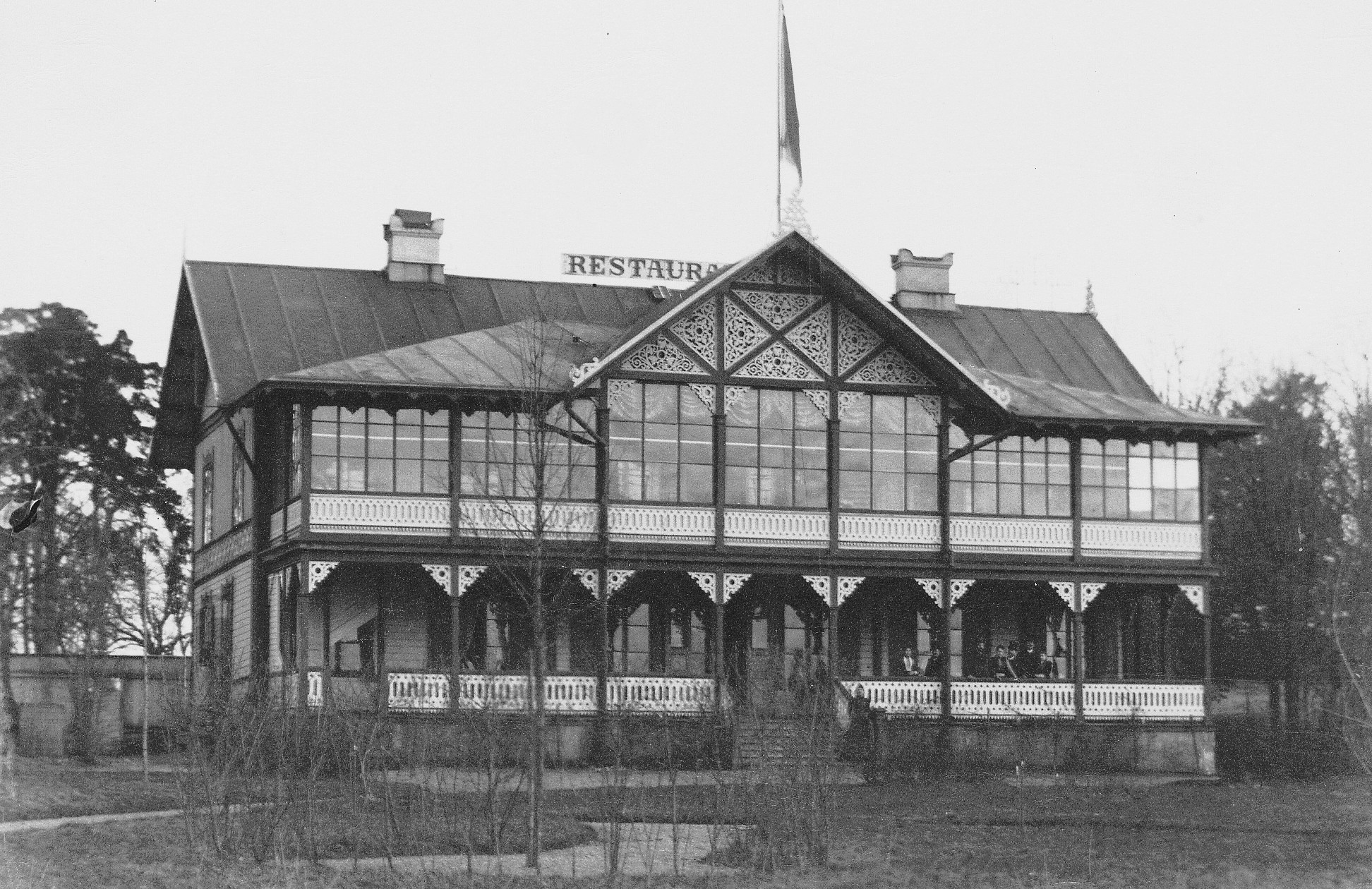 Ulriksdals värdhus